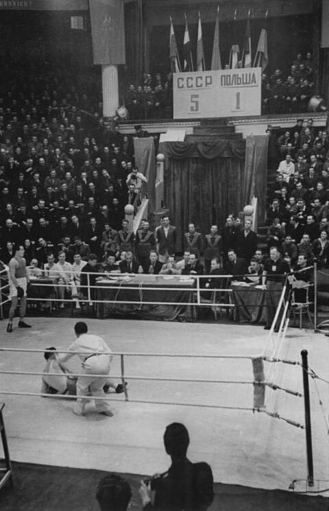 Boris Tichin, Gerhard Mussjal Zentralbild XIII 19.4.1952 Internationale Boxkampf-Meisterschaften in Moskau. Am 7. März begann im Moskauer Zirkus der Freundschaftskampf zwischen Boxern der UdSSR, Polens, Ungarns, Rumäniens, der Tschechoslowakei, Bulgariens, und der Deutschen Demokratischen Republik. UBz: Die Begegnung der Mannschaften der UdSSR-Polen. In der ersten Runde schlug Boris Tichin (UdSSR) Gerhard Mussjal (Polen) k.o.